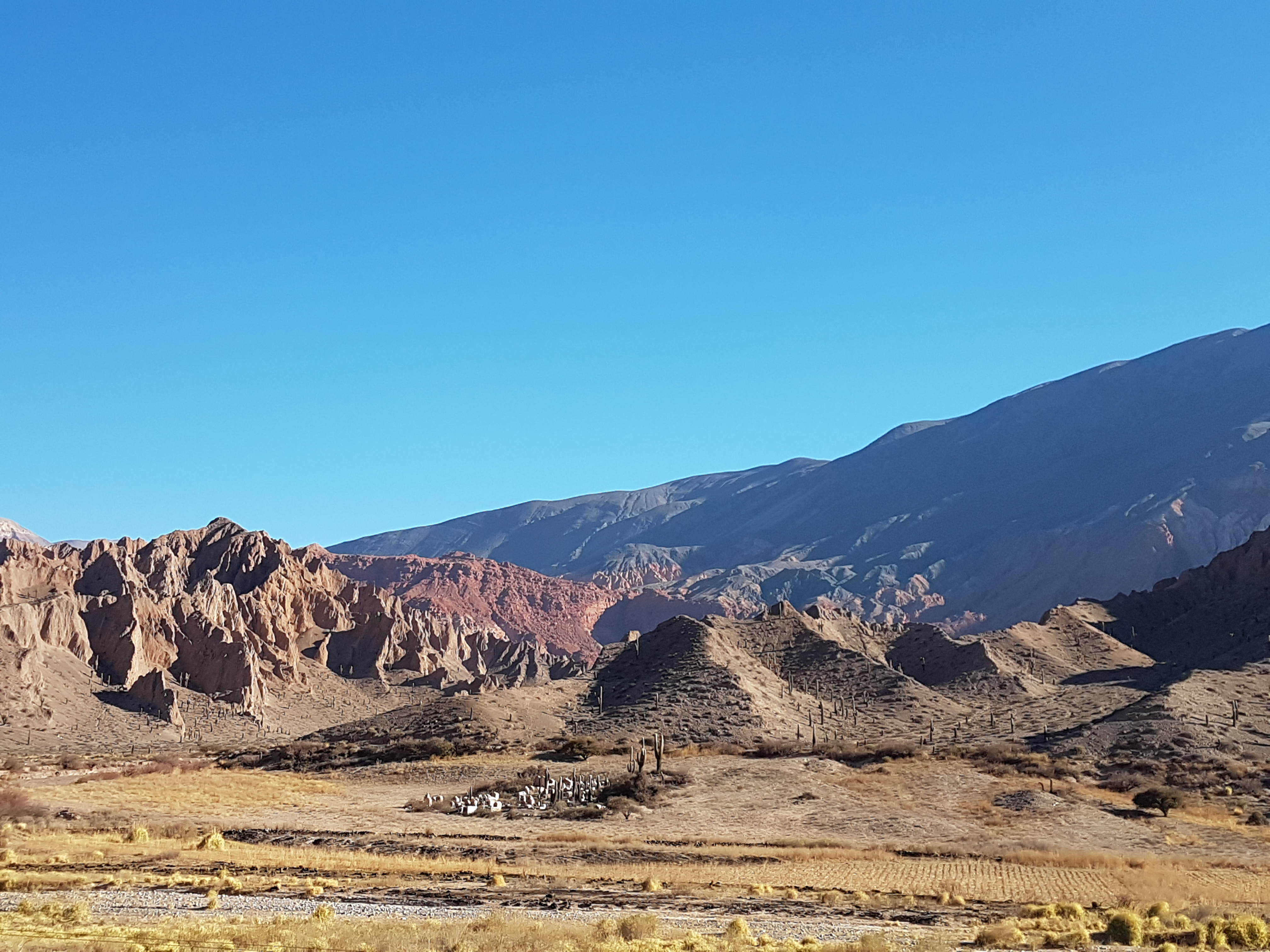 monumento cultural. lugares